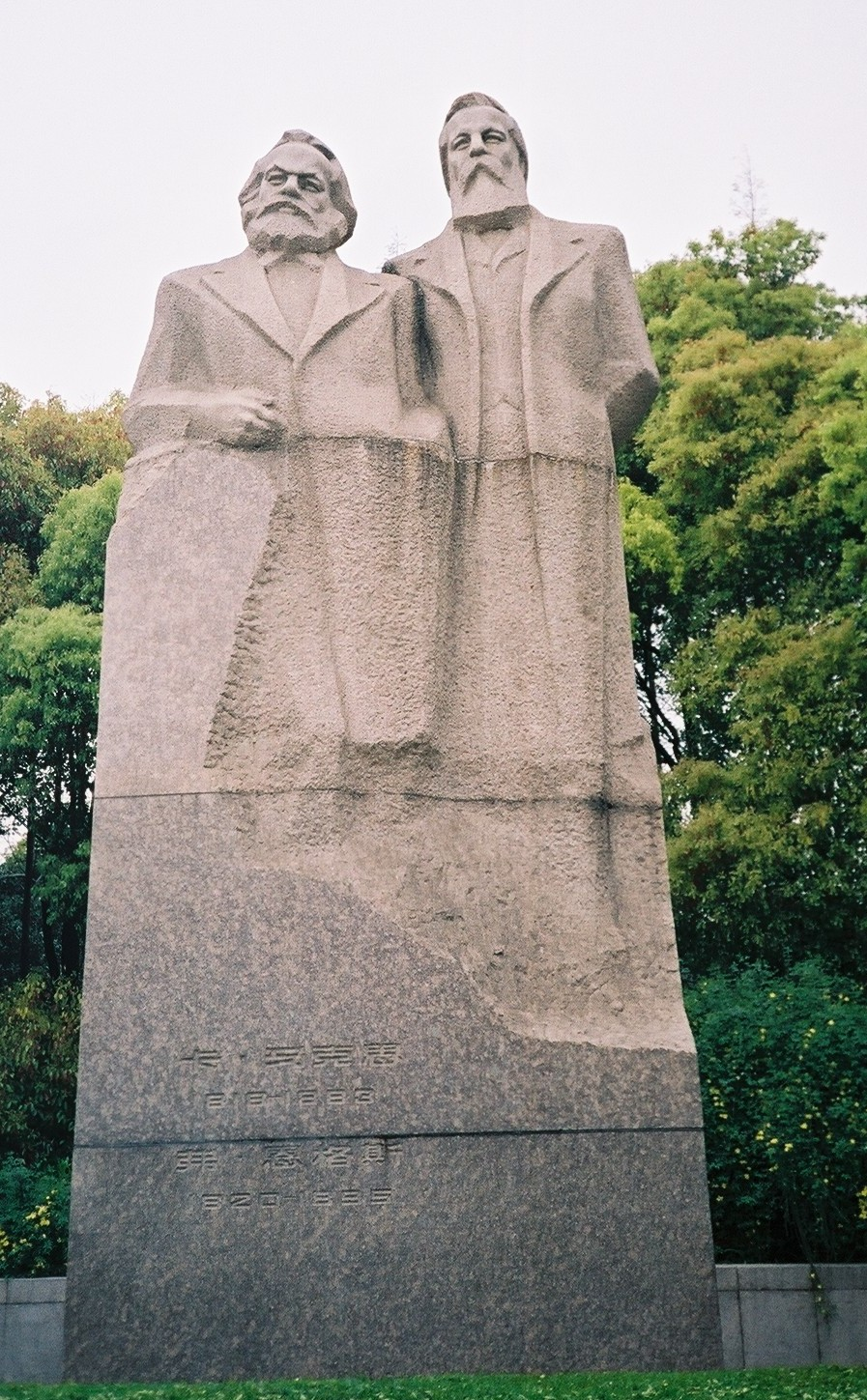 Statue de Marx et Engels à Shanghai